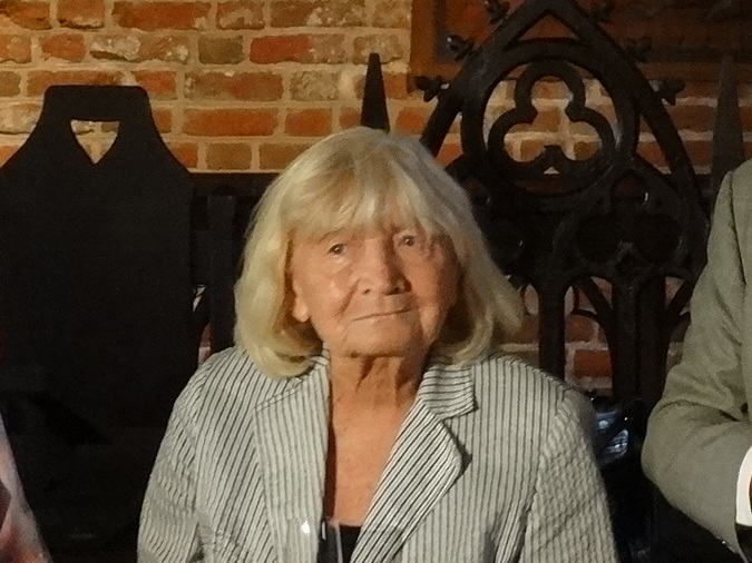 První klapka filmu Jan Hus - Autor: Karolína Černá a Emma Orphe pro & 10Mpix.cz